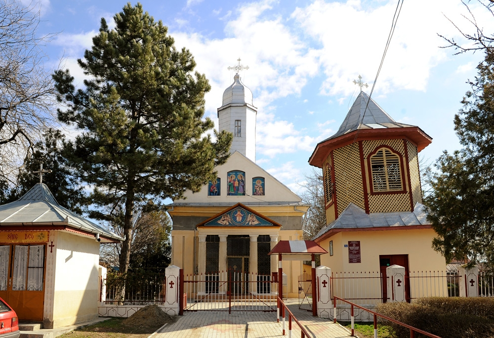 Biserica „Sf. Voievozi”